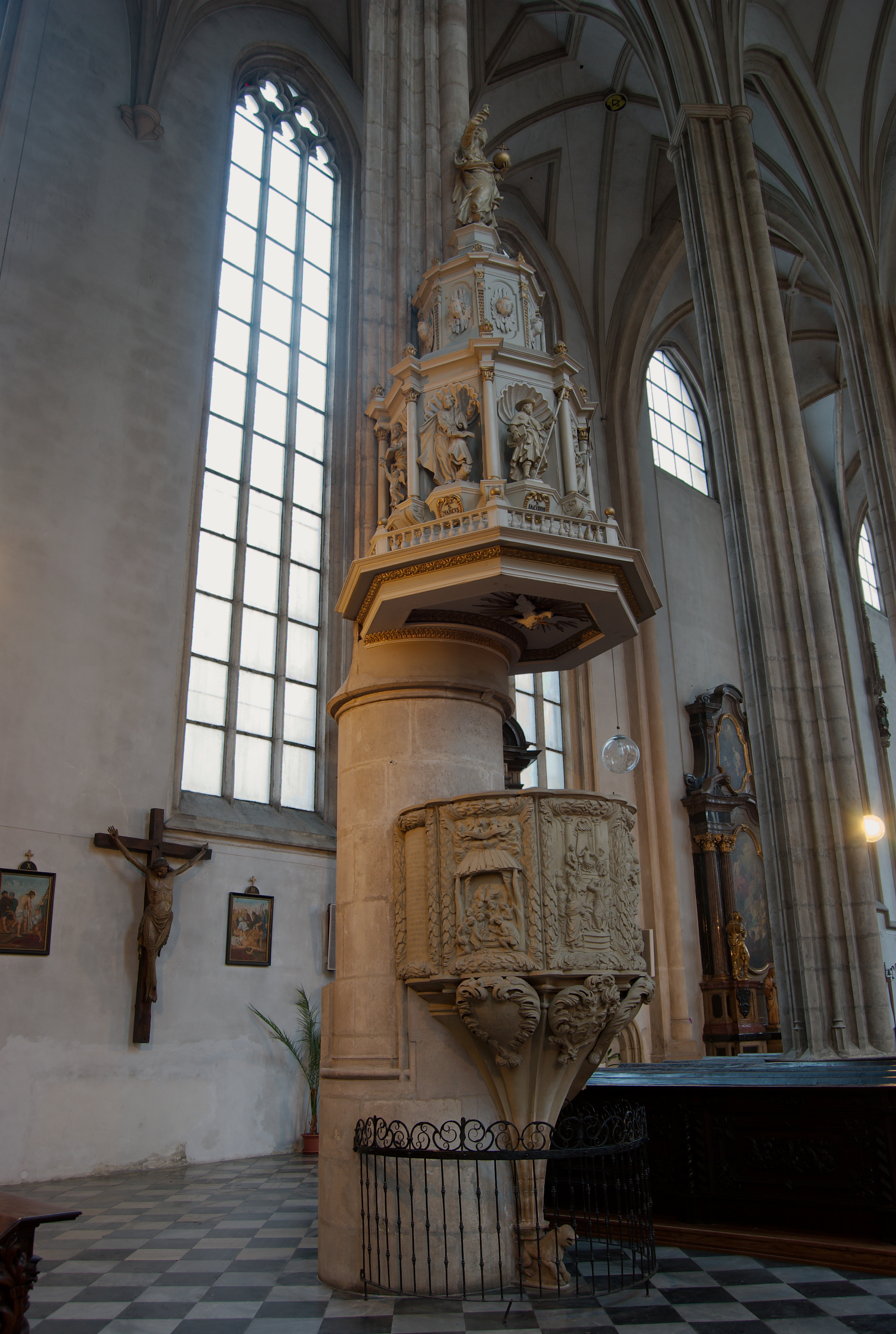 Město Brno - kazatelna v kostele Sv. Jakuba